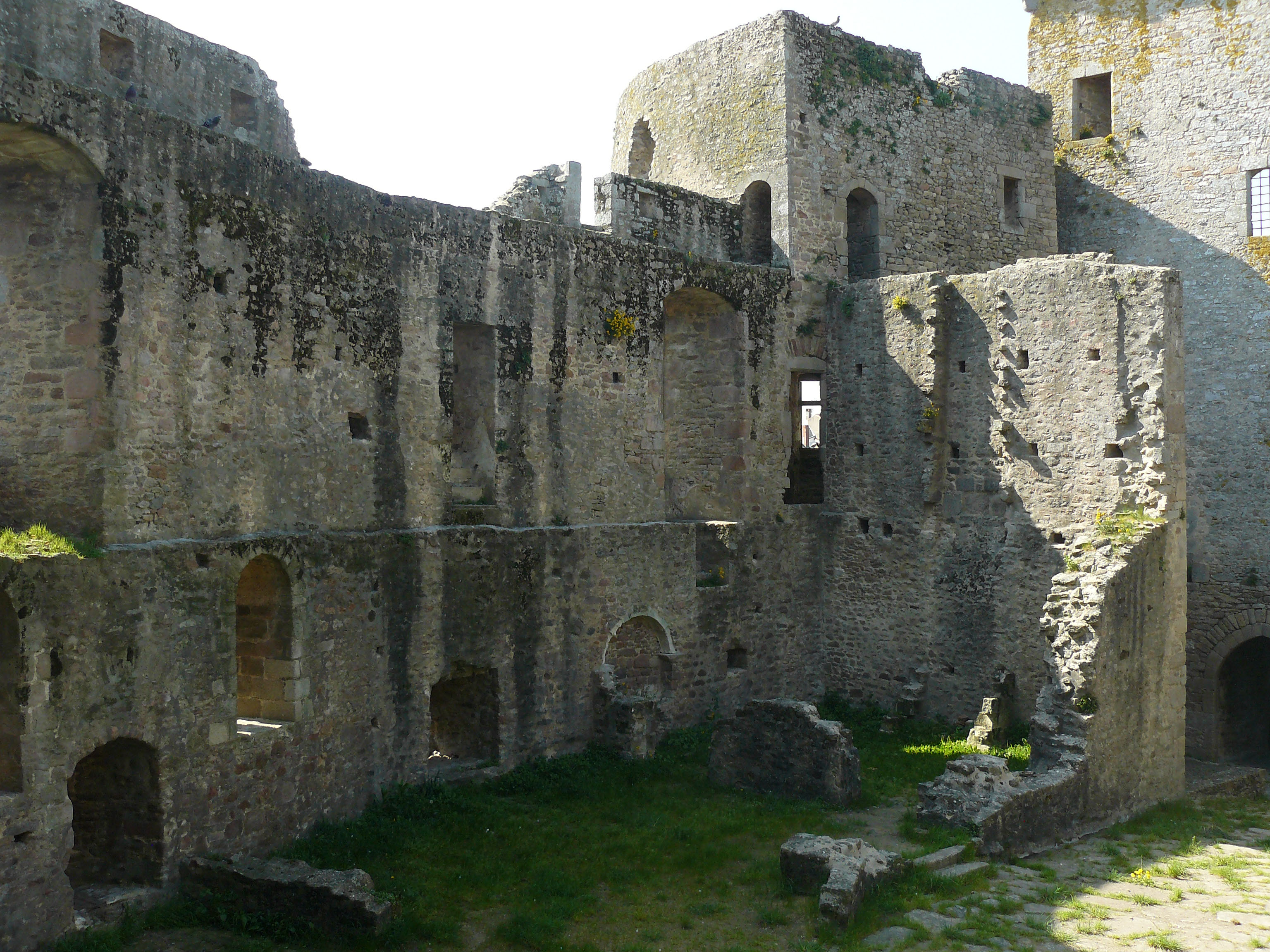 Logis sud du château Clisson